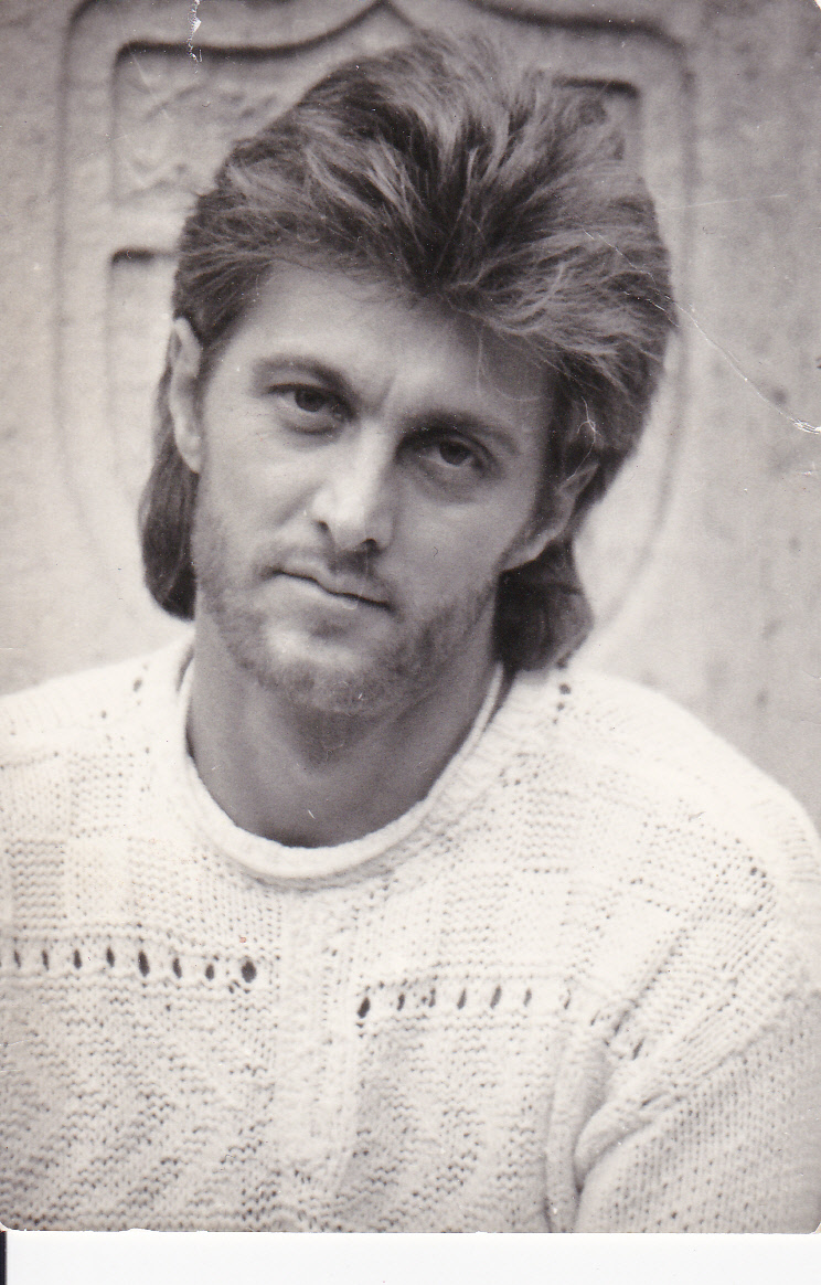 Homonyik Sándor énekes, gitáros